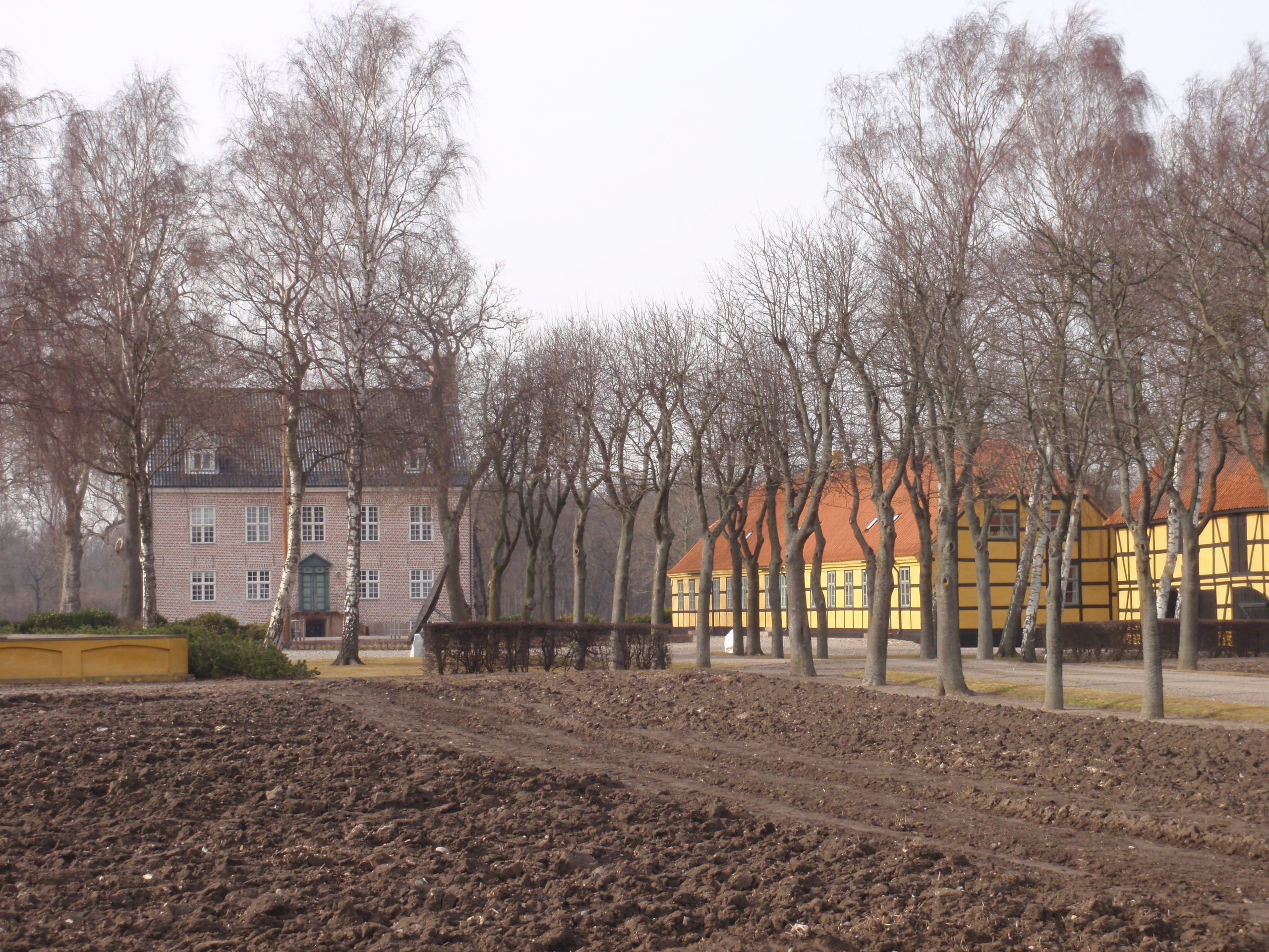 Herregården Bramsløkke, St. Musse, Guldborgsund Kommune